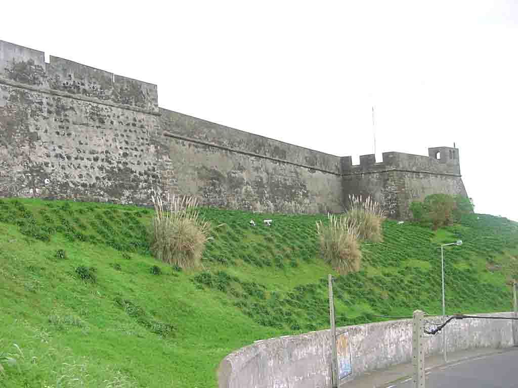 Forte de São Sebastião, muralhas, ilha Terceira, Açores, Portugal.